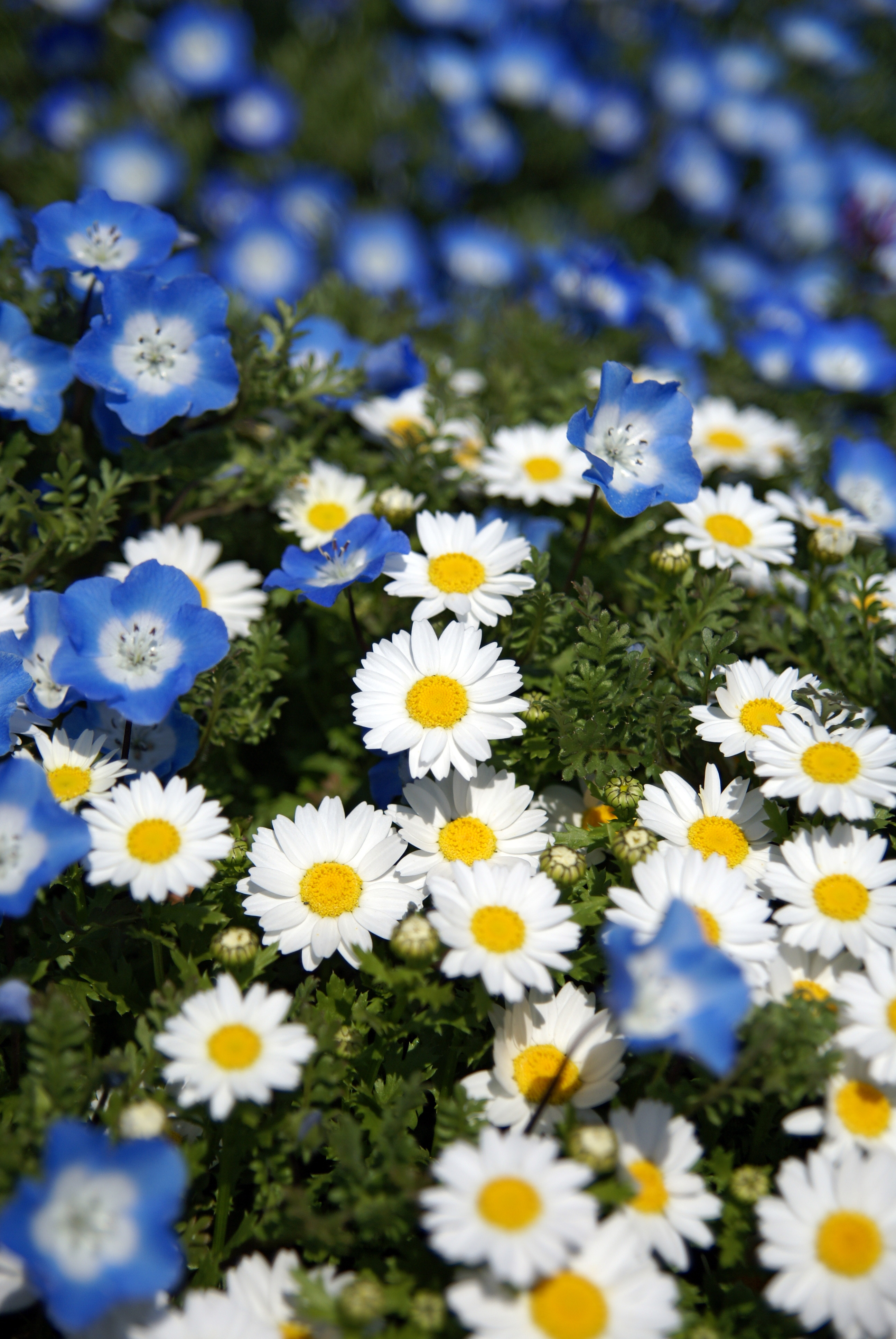 Chrysanthemum and Nemophila of Rinku Park, Izumisano, Osaka Japan